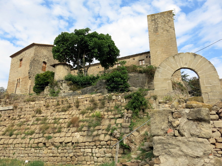 Castell de Espunyola, Bergadà - Catalunya